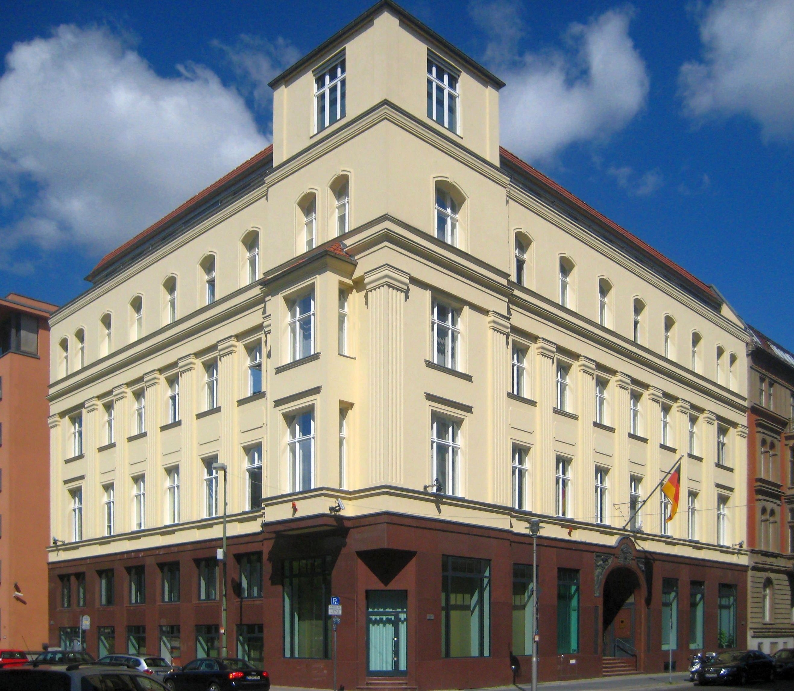 Bürogebäude des Deutschen Bundestages in der Neustädtischen Kirchstraße 15, Ecke Dorotheenstraße, in Berlin-Mitte. Das Haus ist Dienstsitz des Wehrbeauftragten des Deutschen Bundestages. In der DDR-Zeit saß hier der Sportverlag.